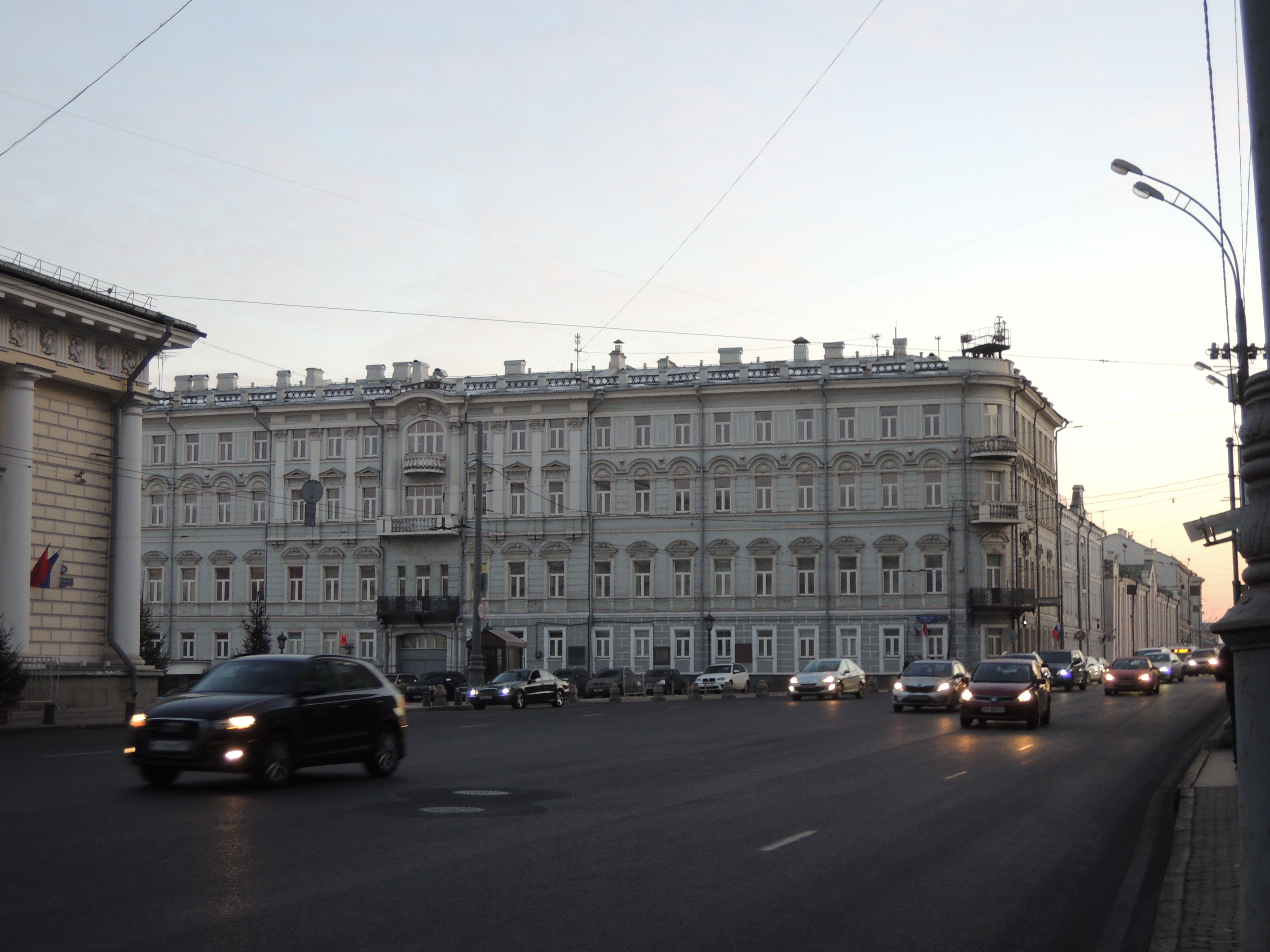 Воздвиженка, д.1